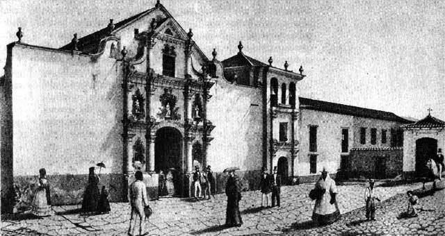 Iglesia y parte del convento de San Francisco, hacia 1845